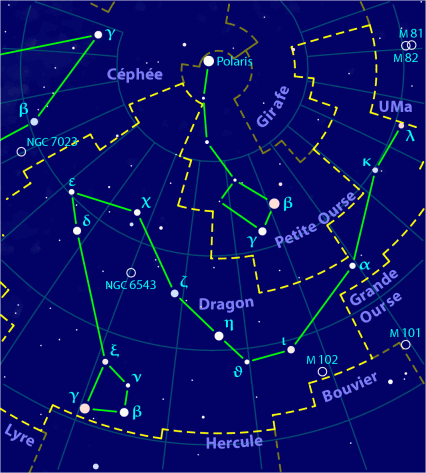 Carte pour la constellation Dragon Produite à l'aide du logiciel PP3